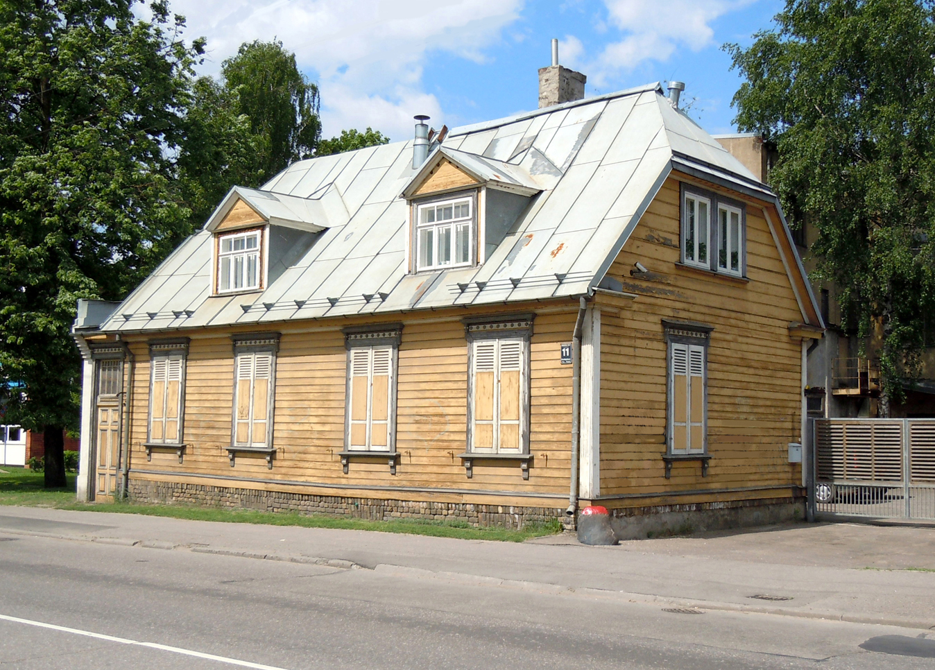 Māja Satekles 11, kurā Kārlis Zāle dzīvoja no 1922. gada līdz 1938. gadam.